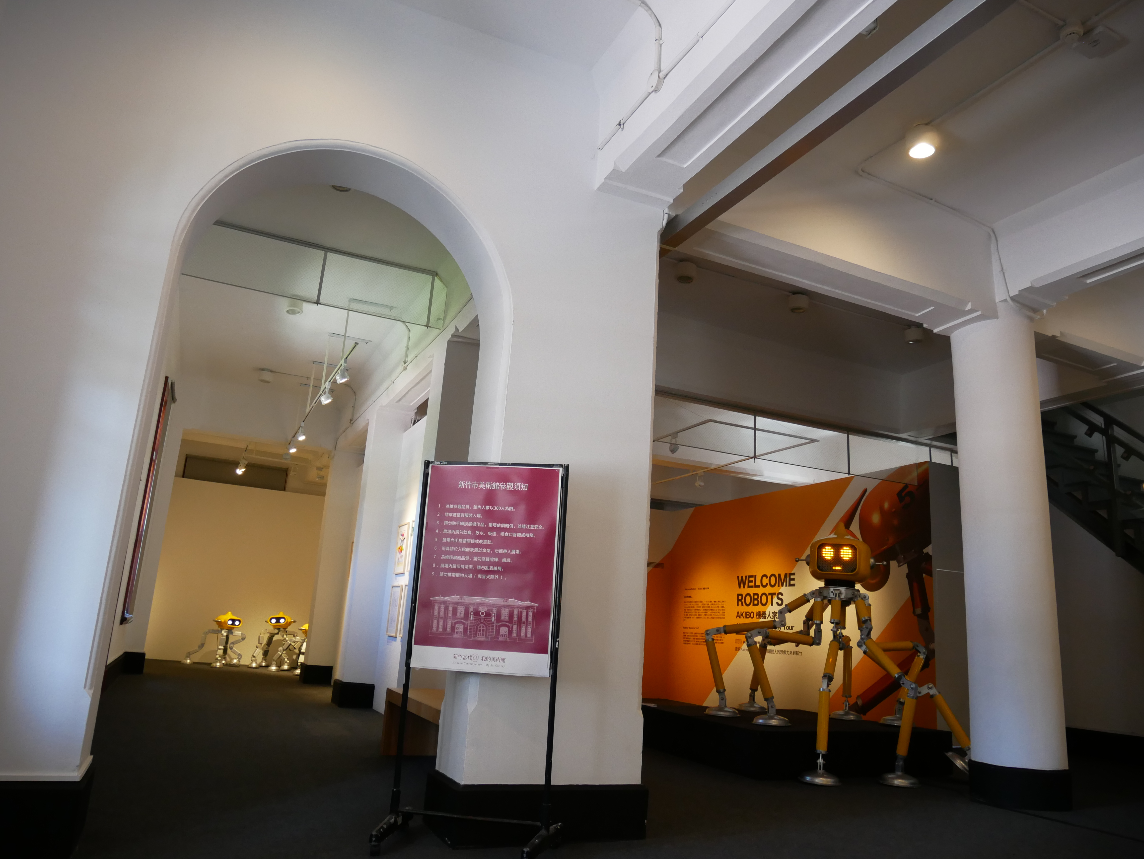 中文（台灣）: 新竹市役所內部，新竹市東區東門聯里中正里